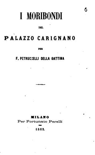 Copertina del libro "I moribondi del Palazzo Carignano" di Ferdinando Petruccelli della Gattina